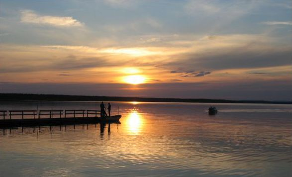 Storsjoen in der Gemeine Sandviken